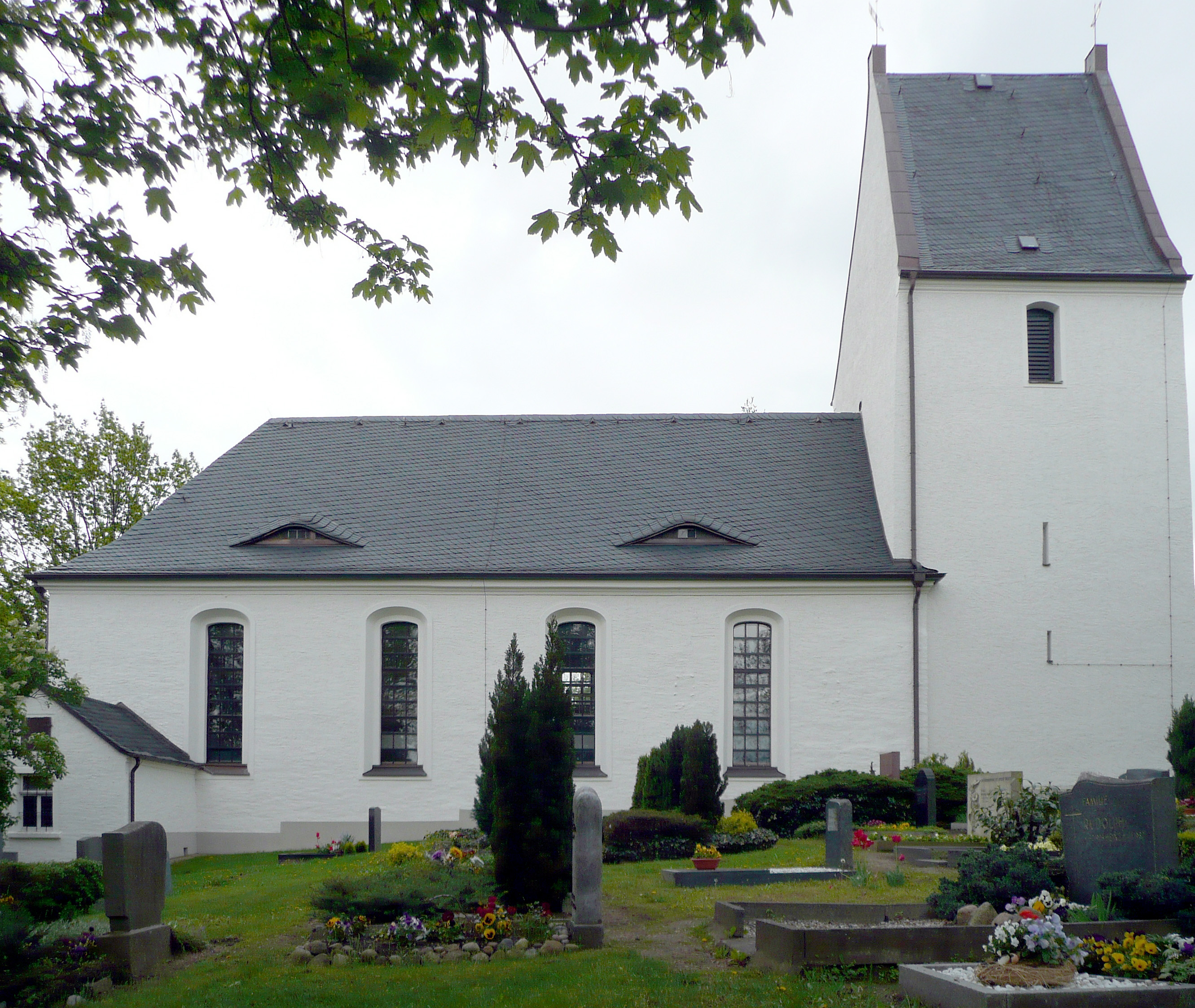 Die Kirche in Panitzsch bei Leipzig, von Norden gesehen